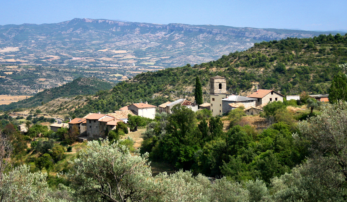 Panillo